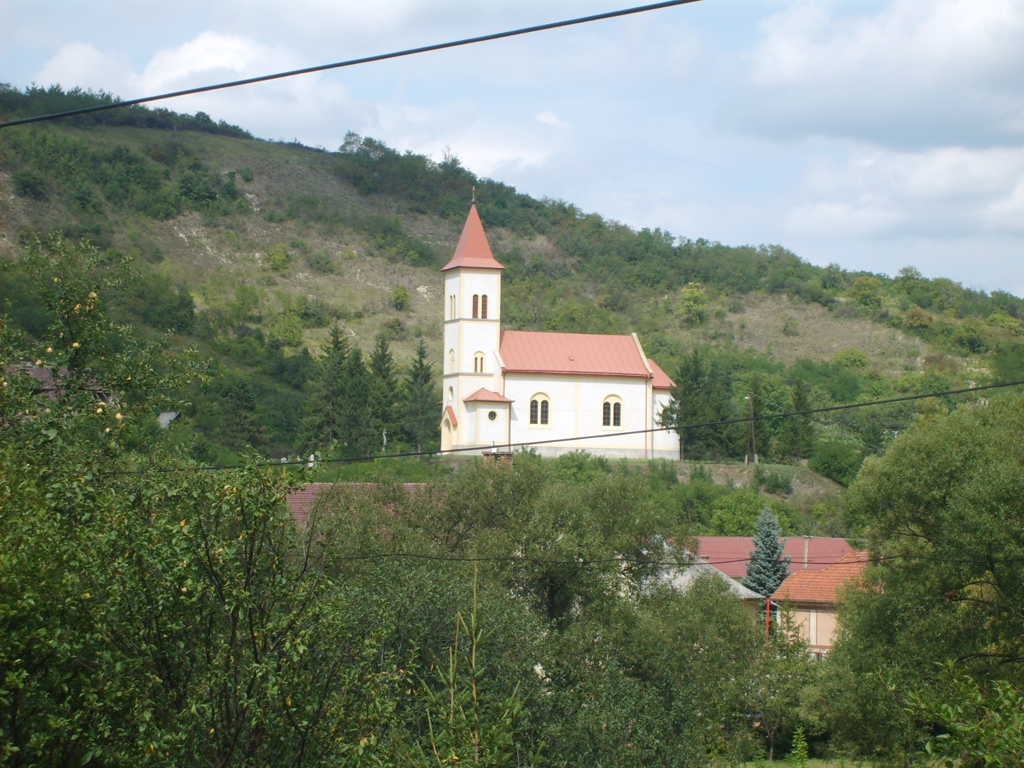 Szűz Mária Isten anyja római katolikus templom, Borsodbóta